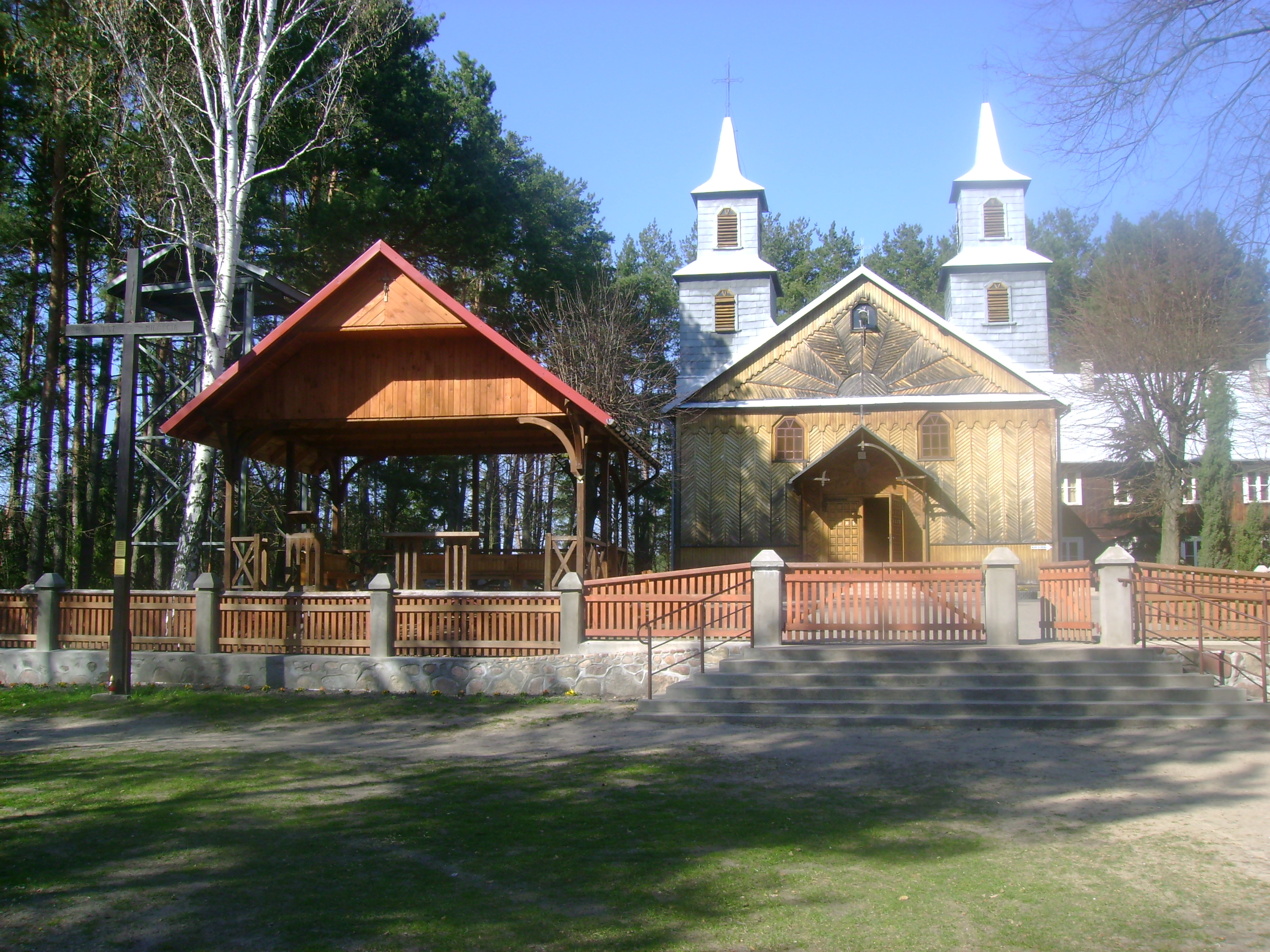 Kościół Kapucynów w Serpelicach.